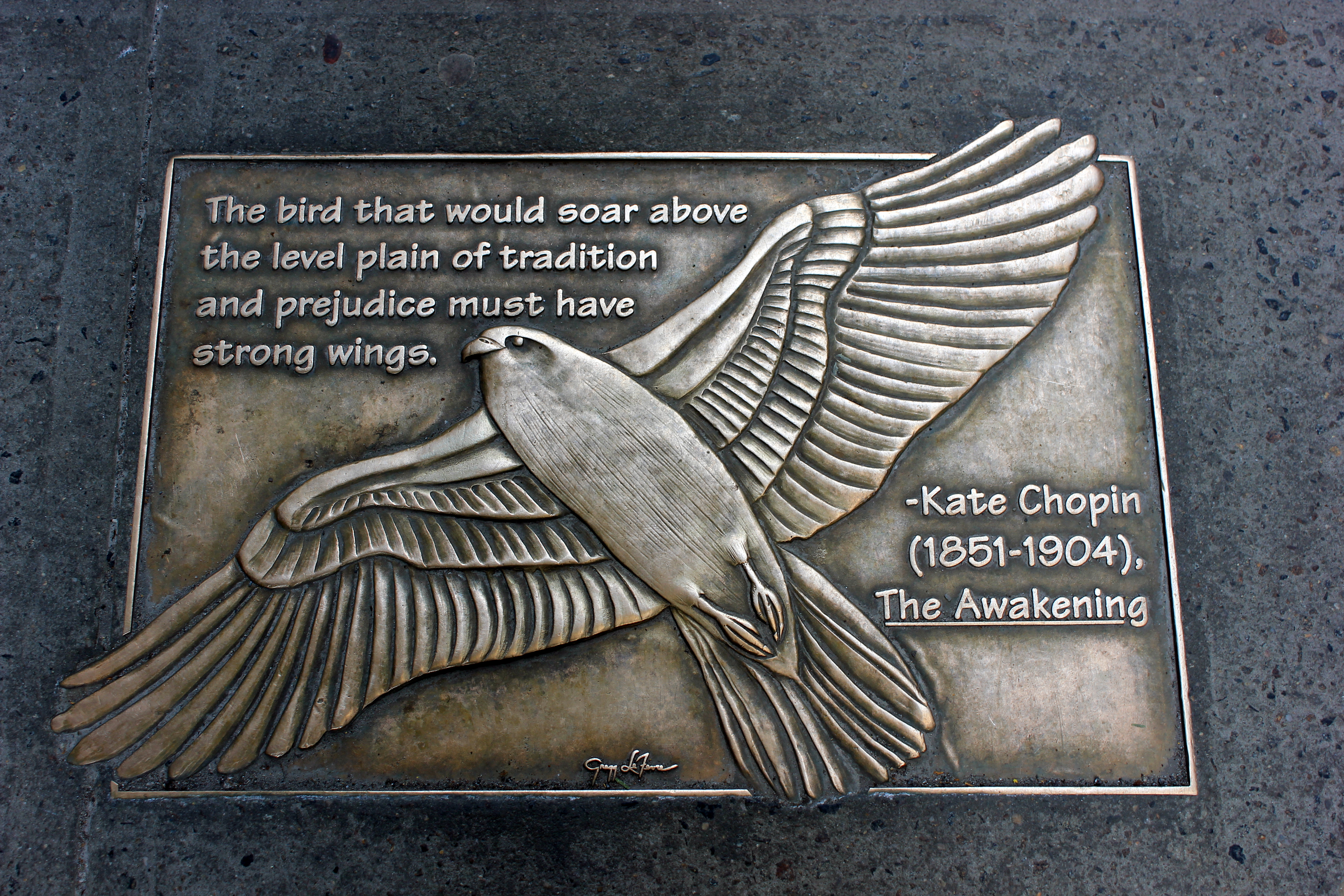 Library Walk New York City